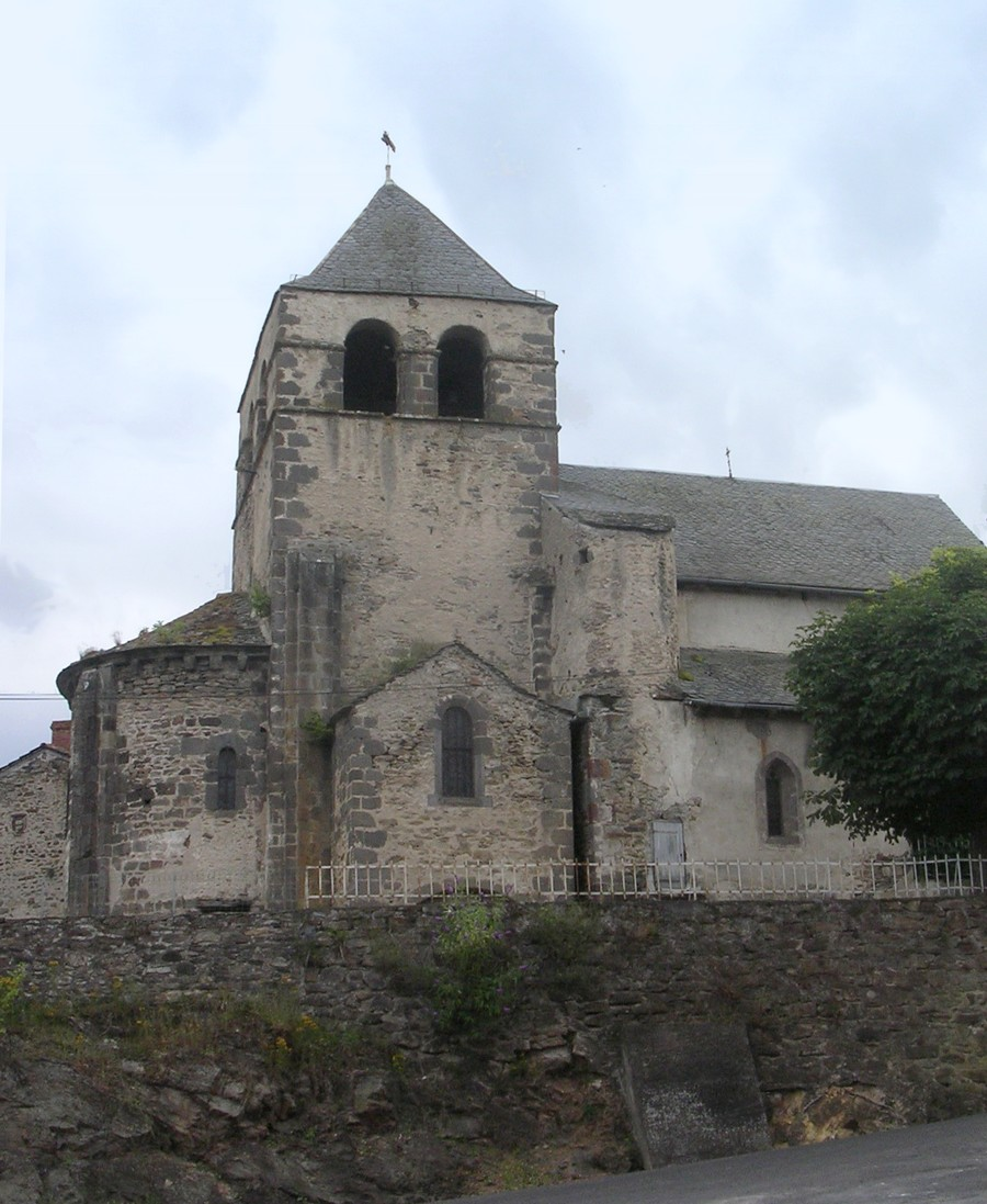 Eglise Saint Nicolas Auriac-l'Eglise (Cantal)